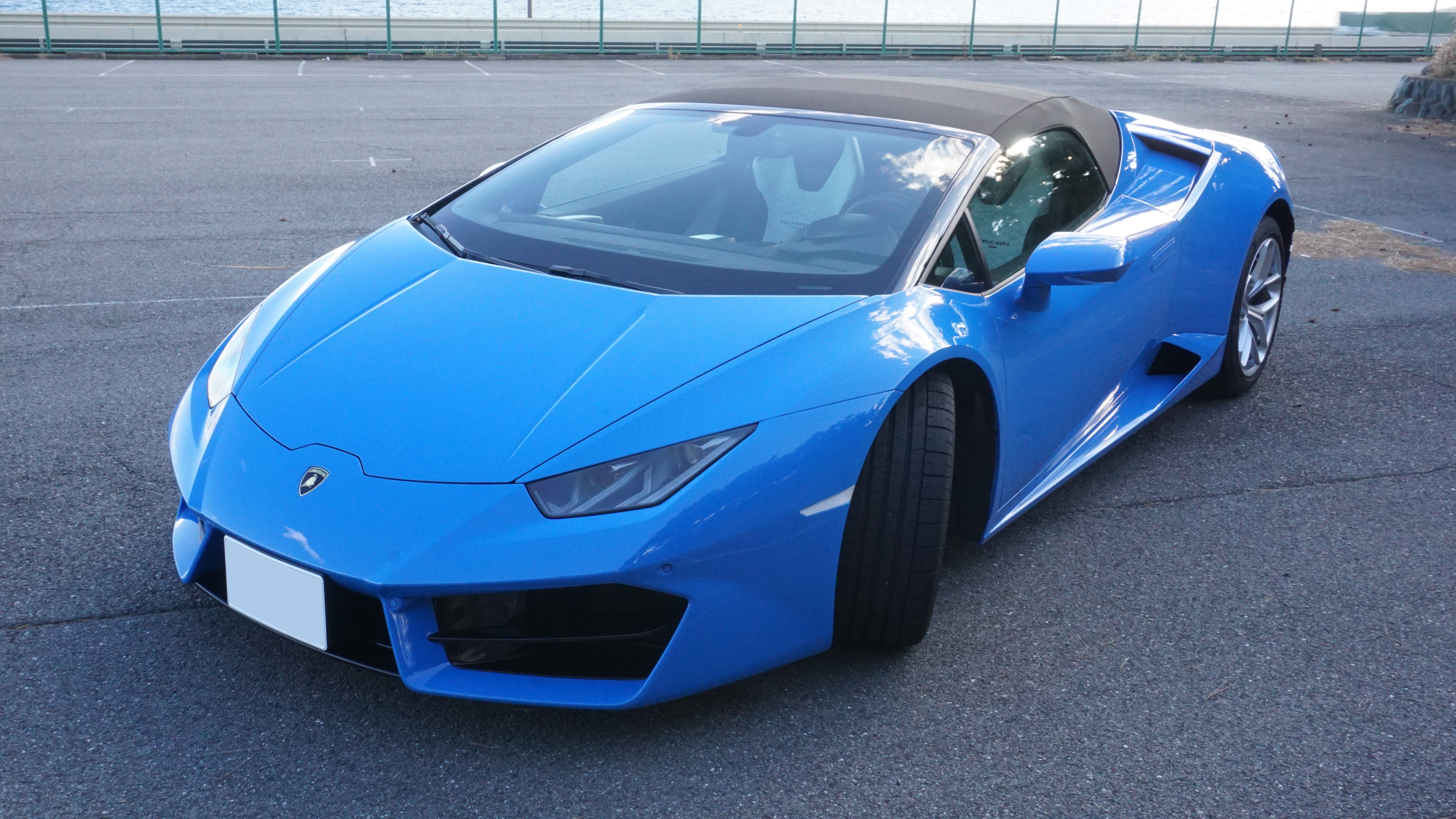 ルーフを閉じた状態のLamborghini Huracán LP 580-2 RWD Spyderフロント部分。